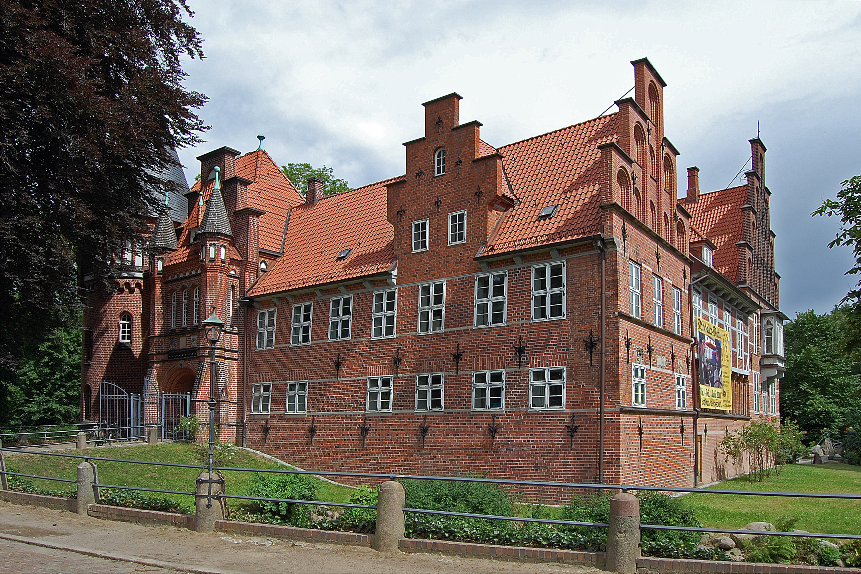 Schloss Bergedorf